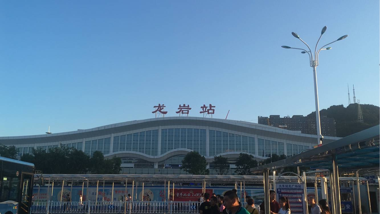 改造后的龙岩站